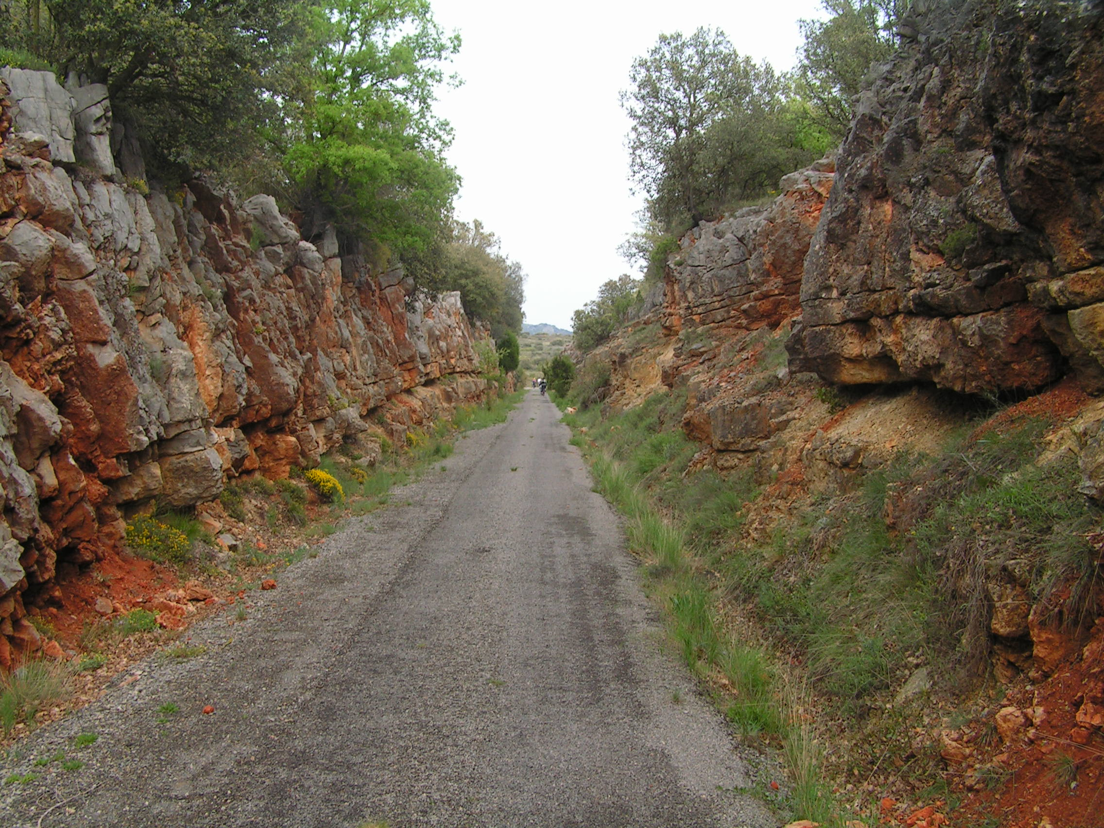 talús a la via verda d'ojos negros passant Barraques i arribant a l'estació del Palancar